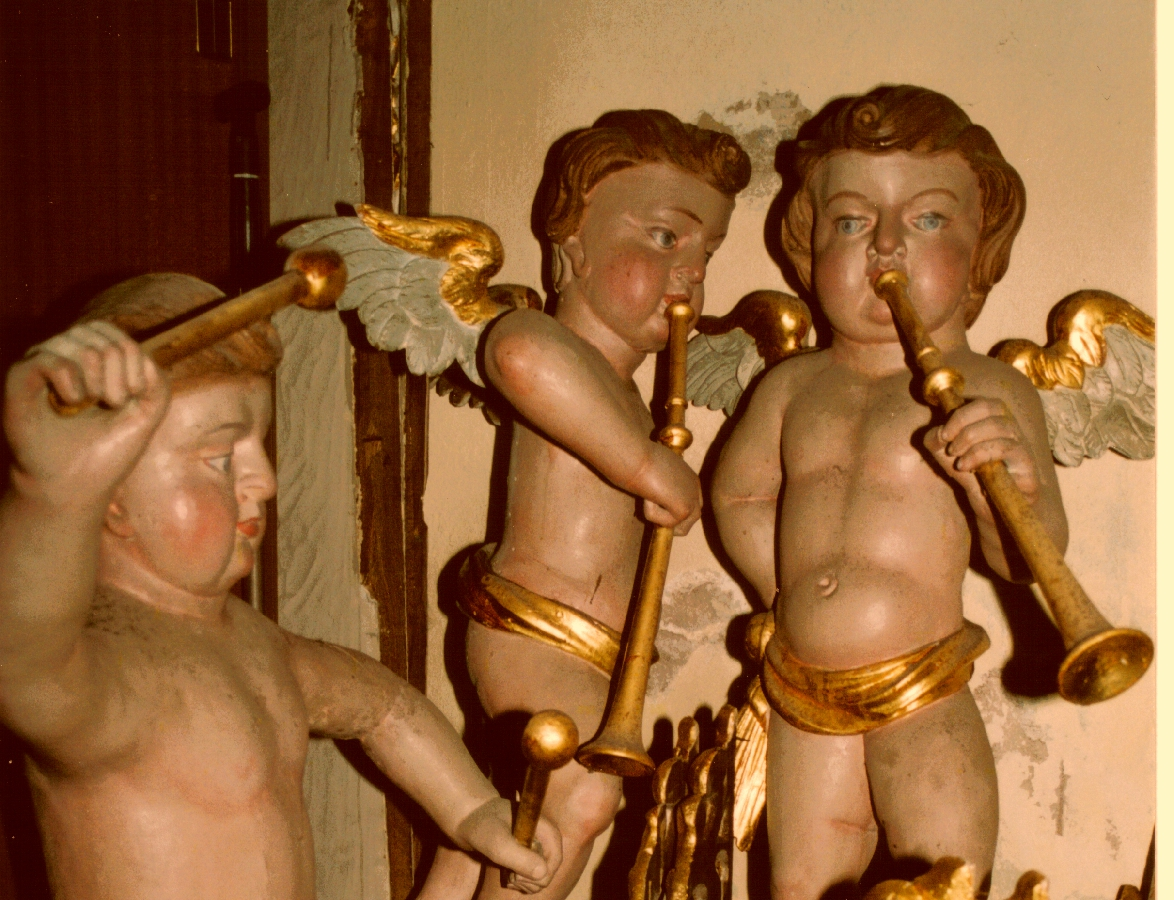 Engelsfiguren der Orgel in der Kilianikirche Höxter